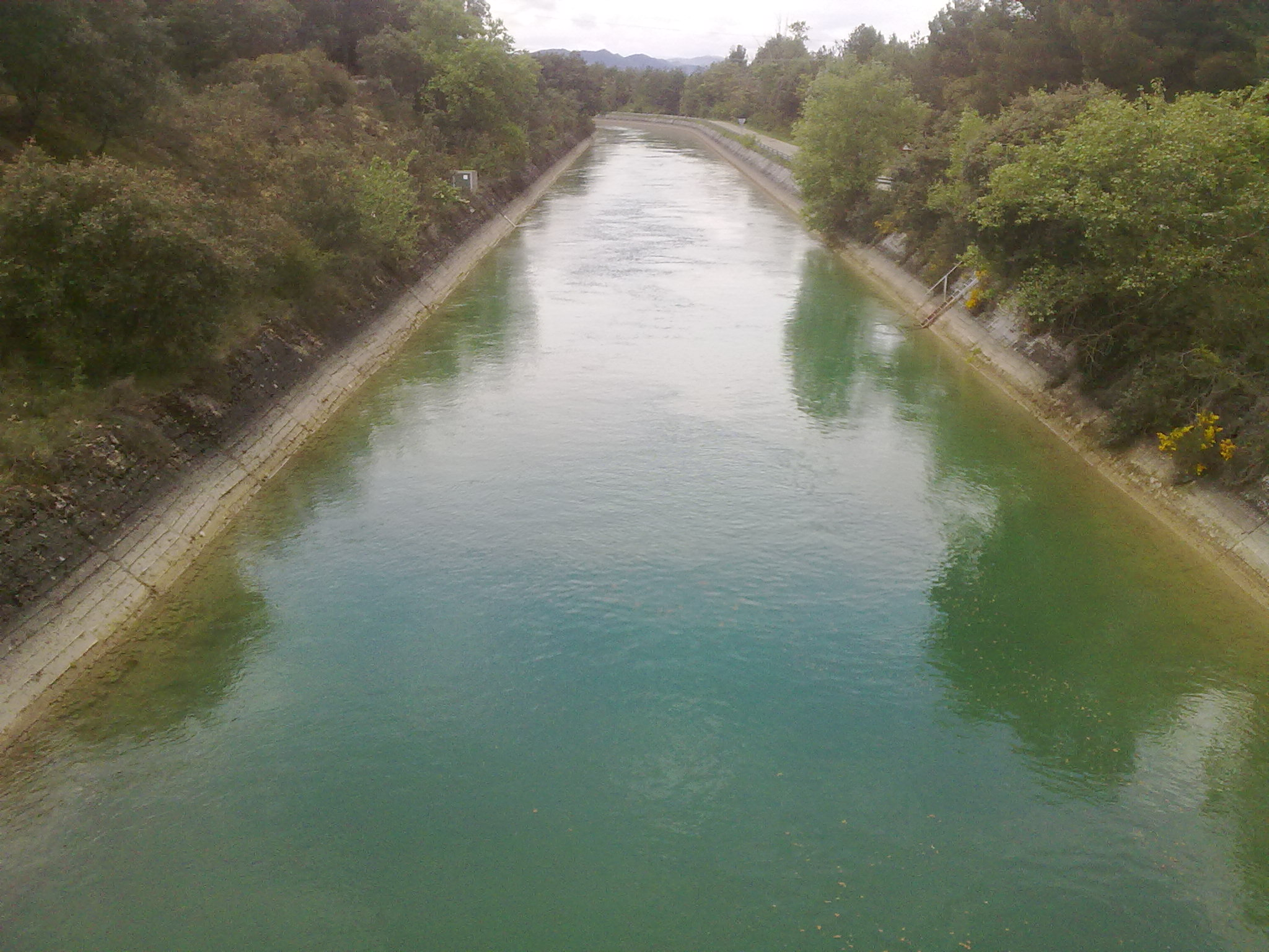 Bardeetako ubidea Gabarderal hegoaldean.